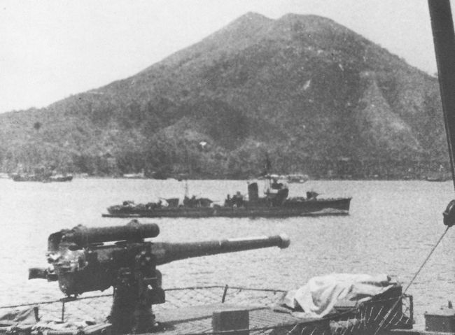 日本海軍 第十九号型掃海艇「第二十号掃海艇」または「第二十一号掃海艇」、ラバウル